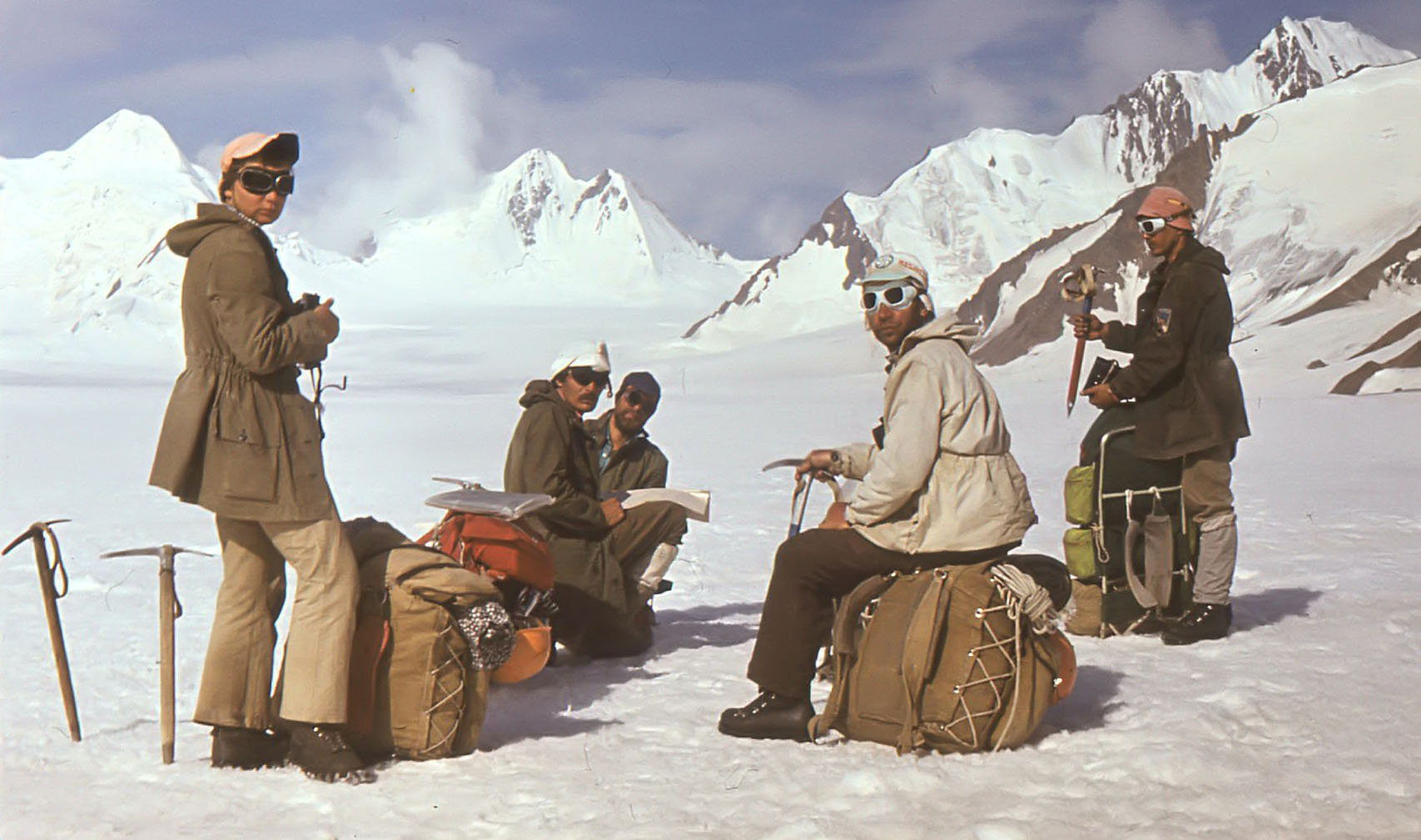 Eesti mägimatkajad Kesk-Pamiiris